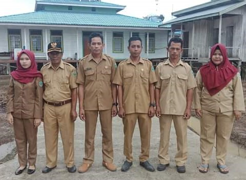 perangkat inti desa muyub ulu